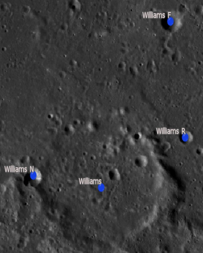 Cráter lunar Williams. Cráteres satélite. (Imagen LRO)